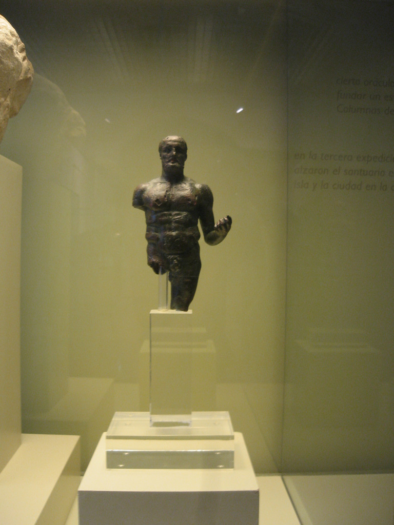 Estatuilla de bronce del Hércules Gaditano (Islote de Sancti Petri-Provincia de Cádiz-Andalucía-España)